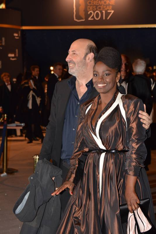 Cédric Klapisch et Aïssa Maïga à la cérémonie des César